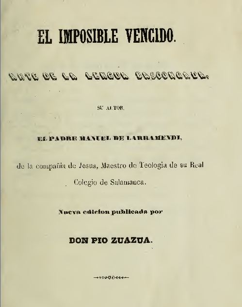 El Imposible Vencido, aita Larramendiren liburua (1853ko argitaraldia). Derivative work from File:El_imposible_vencido_(1853).pdf